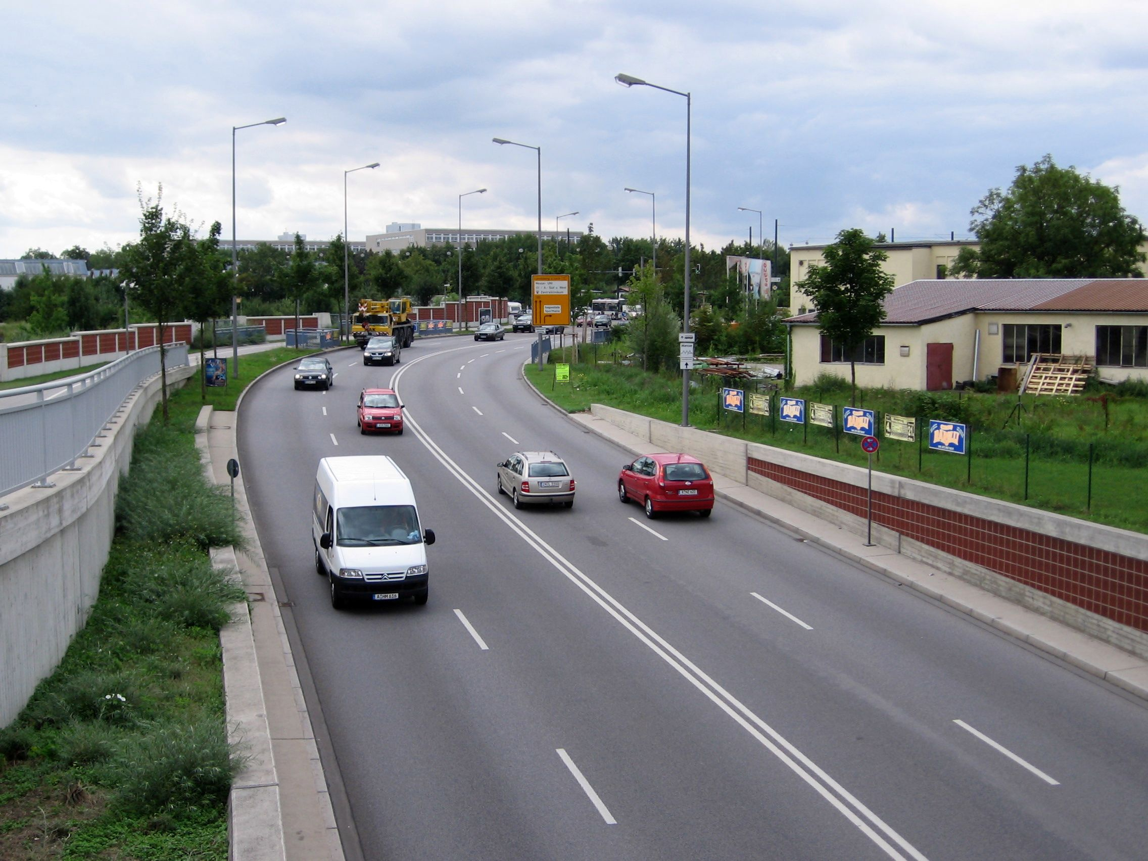 Bundesstraße 300 in Augsburg